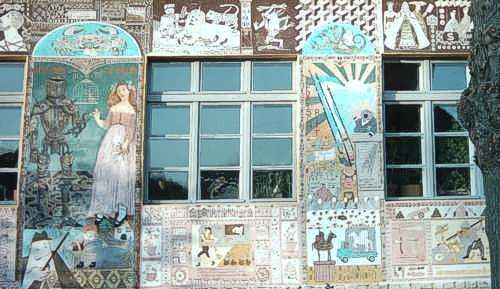 Freskogalerie des Lügenmuseum in Gantikow.